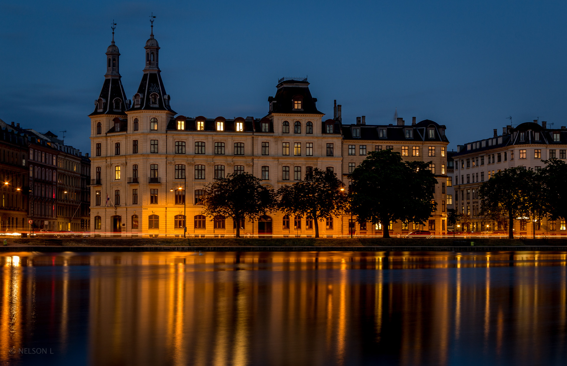 Søtorvet in Copenhagen, Denmark